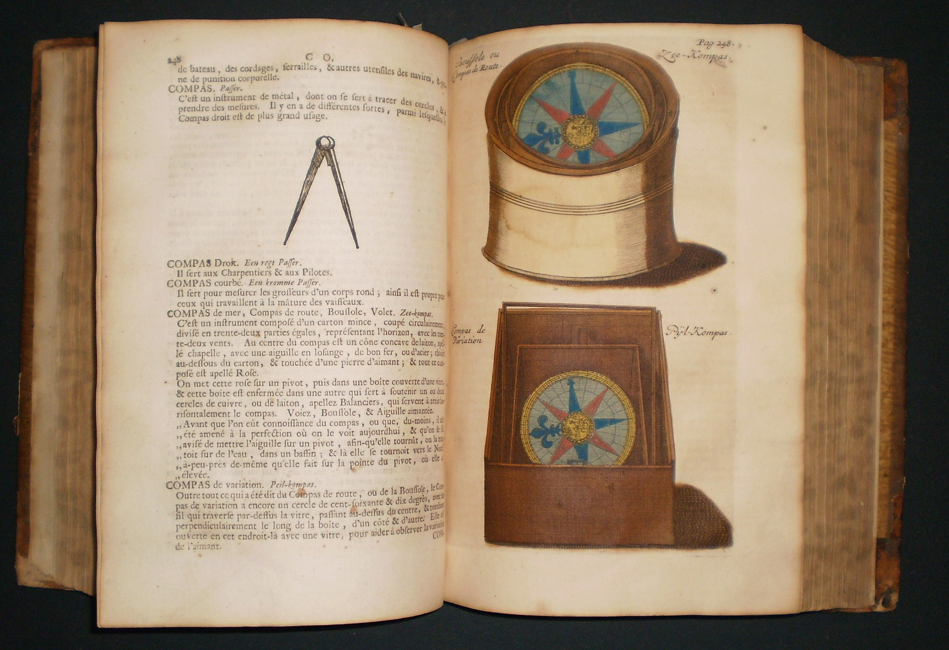 Pagine di un antico dizionario (o enciclopedia) francese, con illustrazioni. Dall'archivio della libreria Bourlot di Marco Birocco, Torino